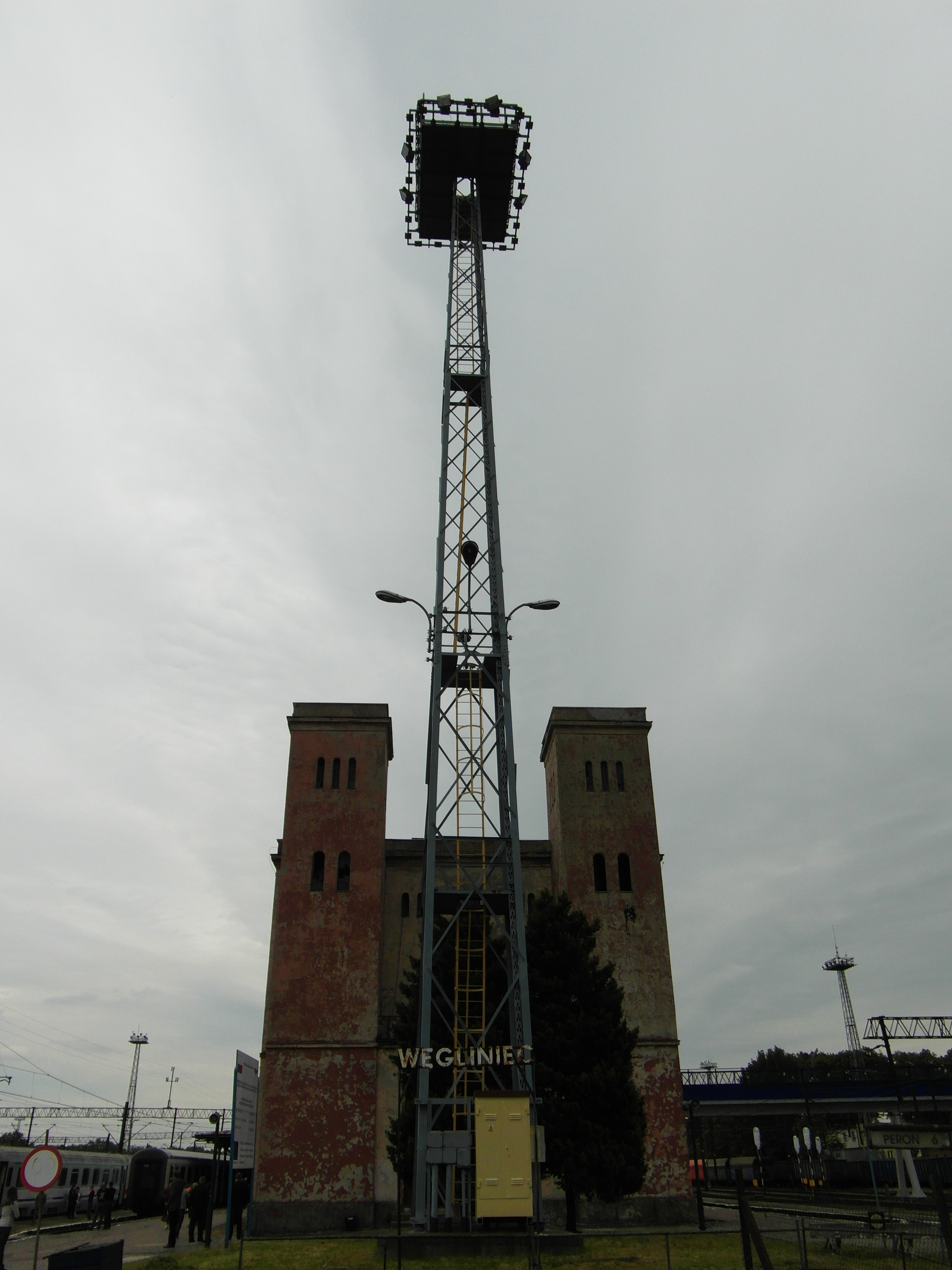 Kohlfurt - Bahnhof